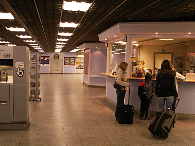 Gare Liège-palais, Belgique